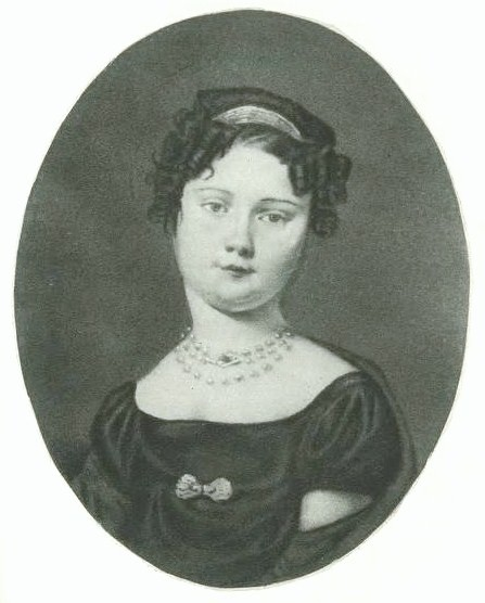 Текла (Фекла) Игнатьевна Шувалова, ур. Валентинович (1801—1873), в первом браке графиня Зубова.